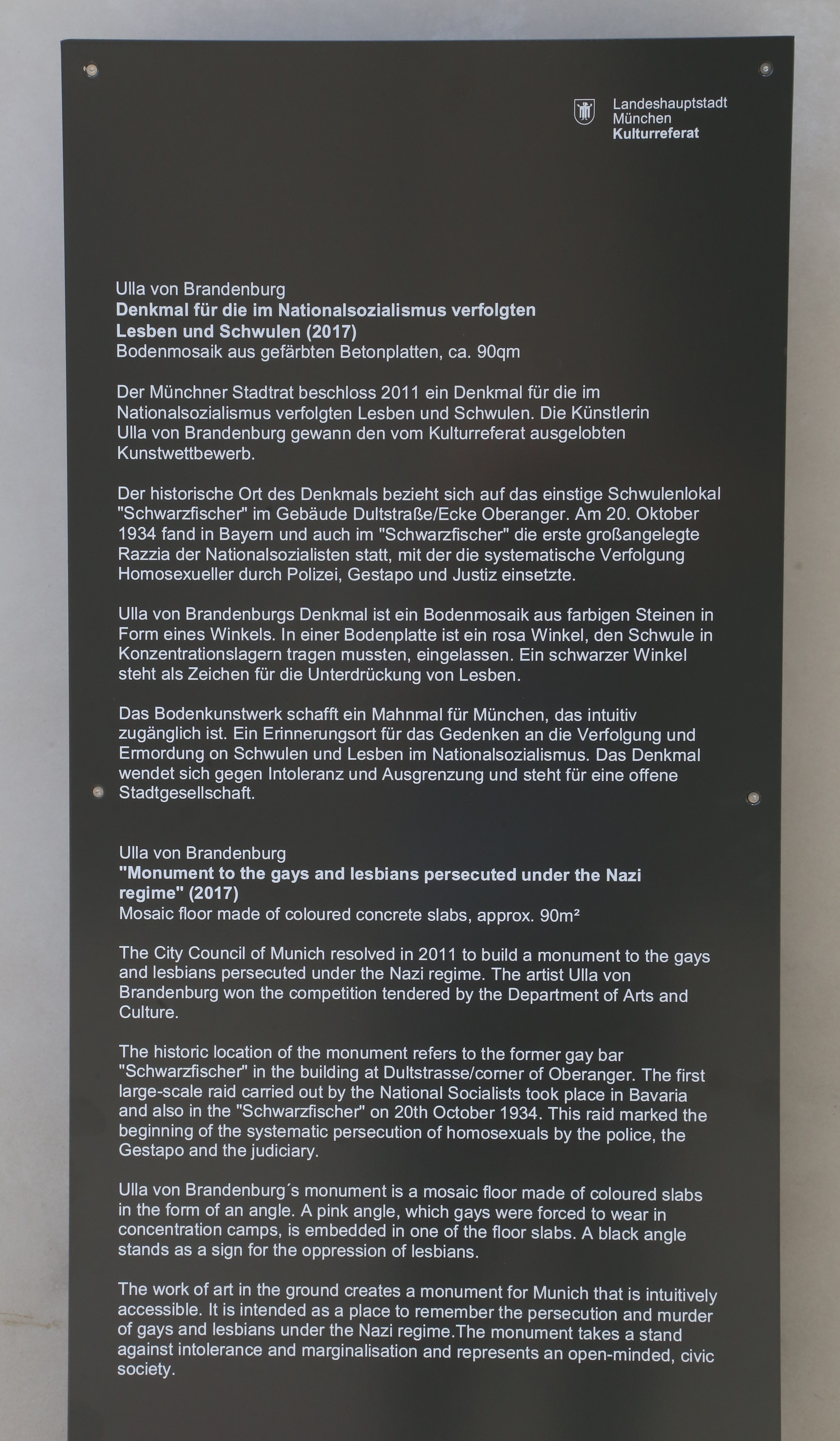 Denkmal für die in der NS-Zeit verfolgten Lesben und Schwulen, Oberanger/Dultstraße, München; der Entwurf stammt von der Künstlerin Ulla von Brandenburg.